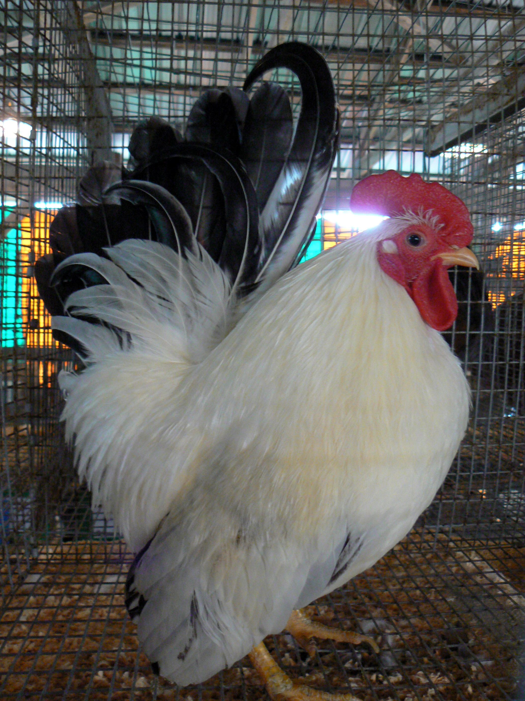 A Japanese Bantam rooster